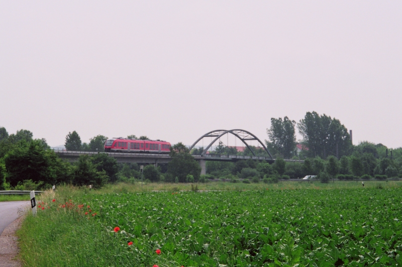 Triebwagen der Oberweserbahn nach Ottbergen (bei Höxter, NRW) bei Goettingen auf der Brücke über die Schnellfahrstrecke und die B 3 - Regional Train to Ottbergen (North Rhine-Westphalia, Germany) on a bridge over the high speed line at Goettingen, Lower Saxony, germany